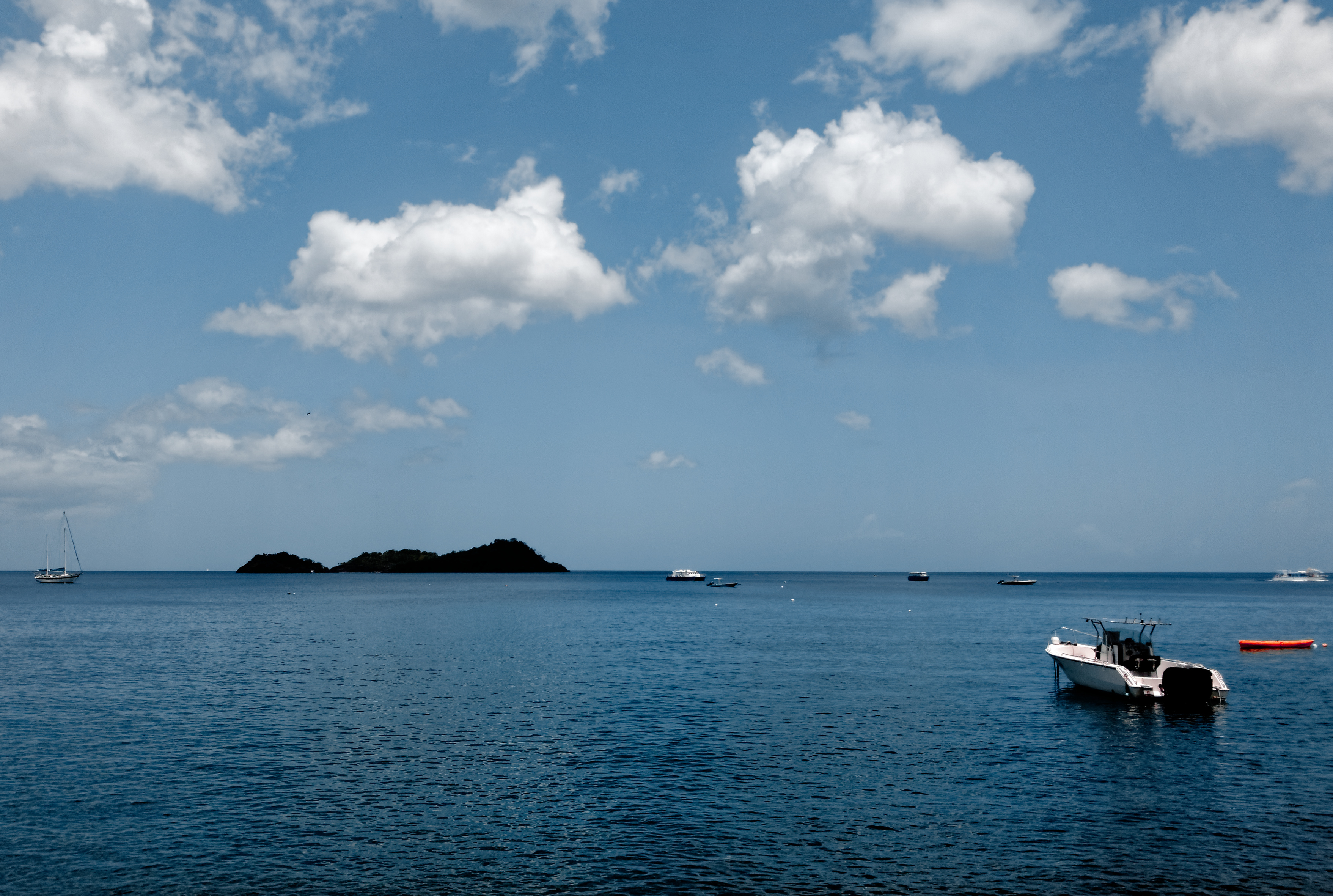 Embarcation réserve Cousteau